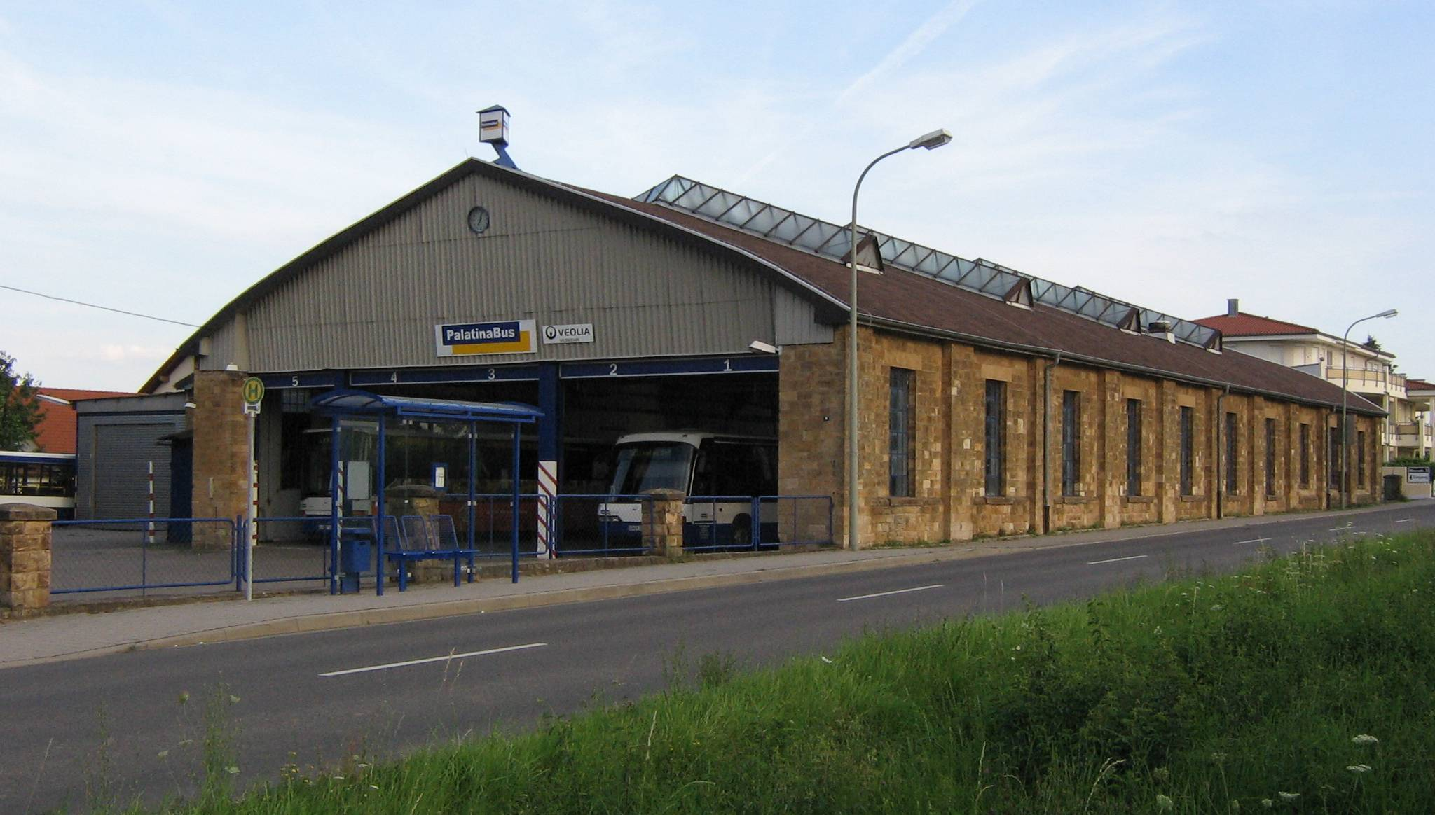 Edenkoben, Busdepot, früher Betriebshof Pfälzer Oberlandbahn